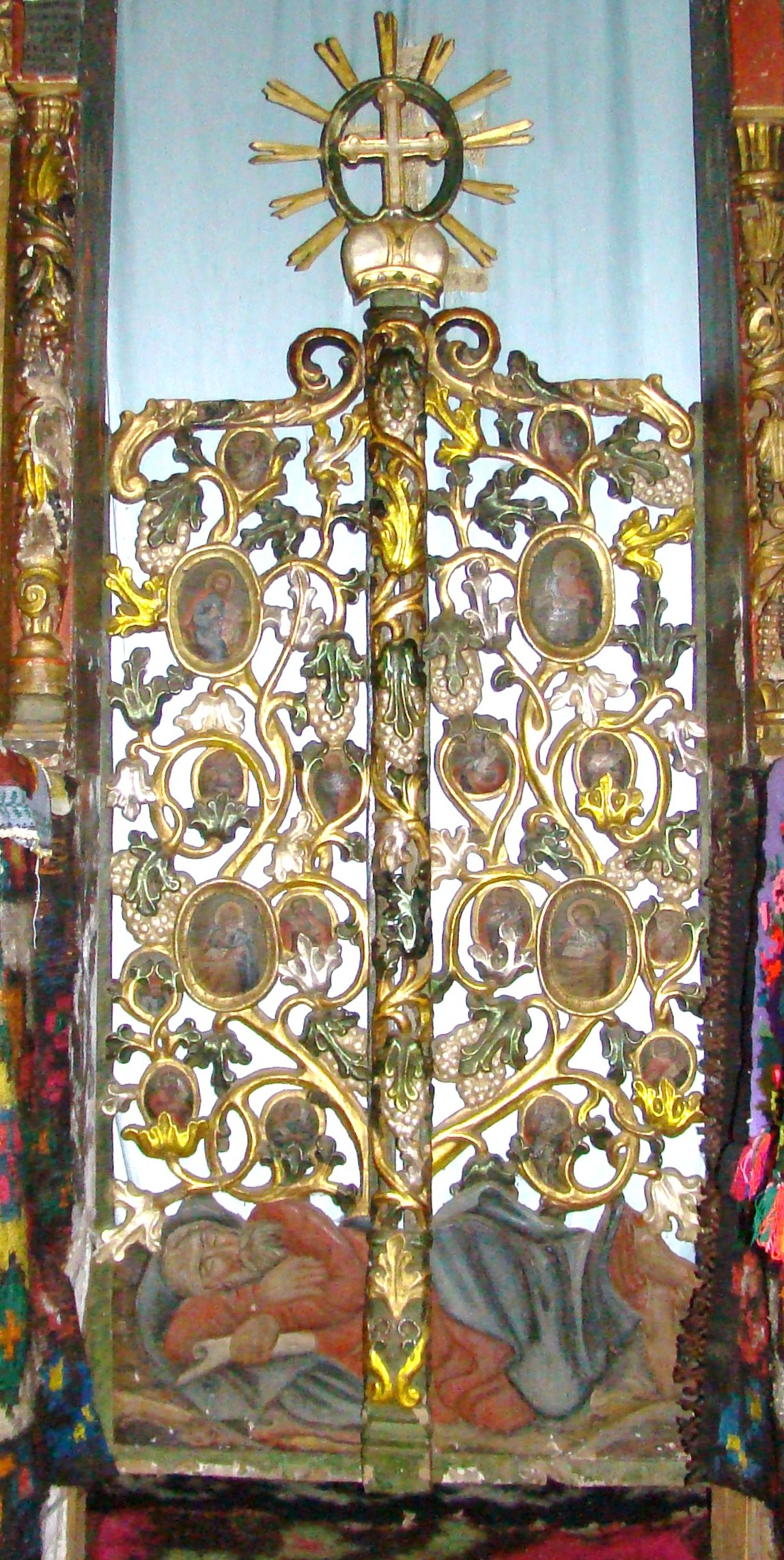 Biserica de lemn "Cuvioasa Paraschiva" , sat POIENILE IZEI